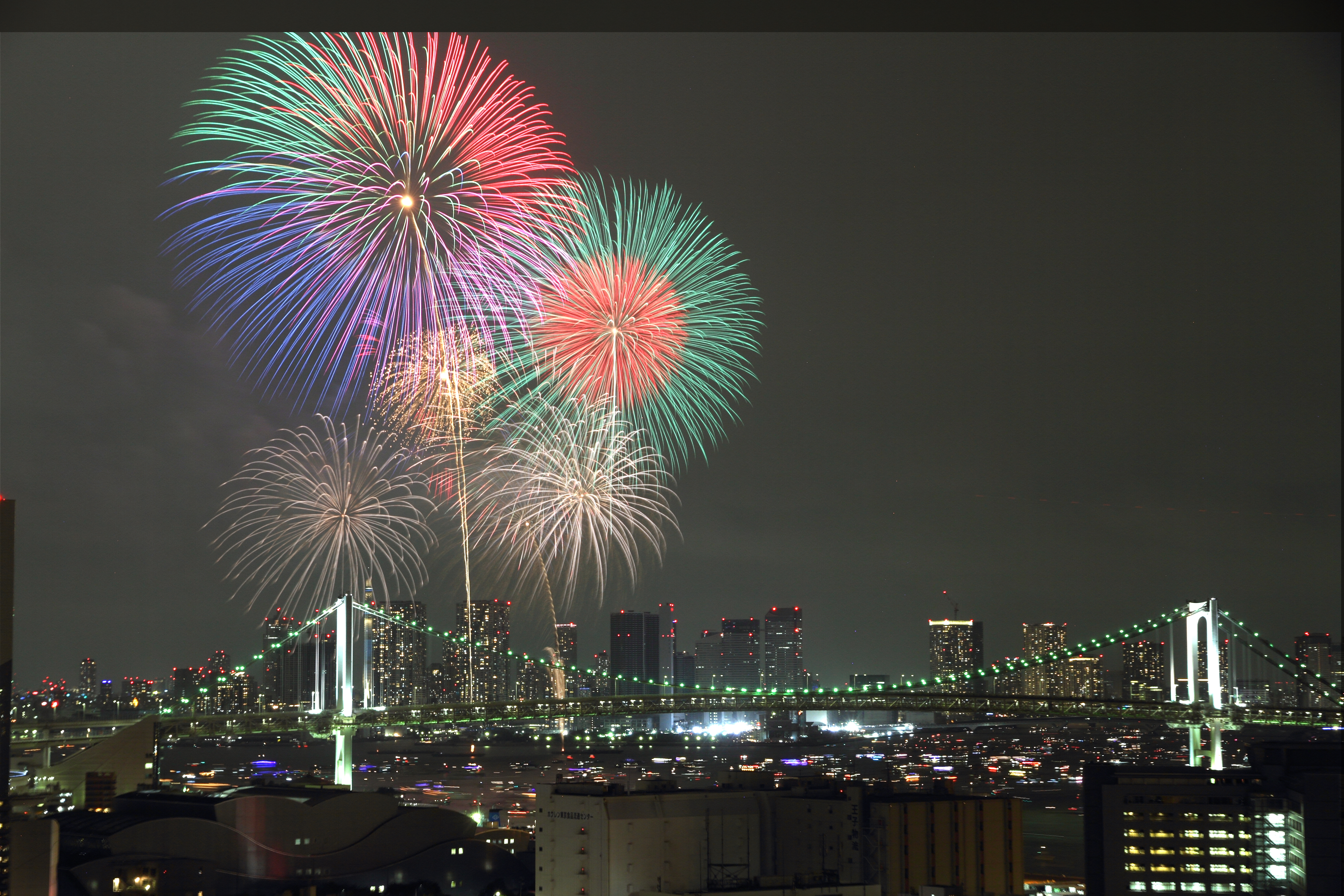 開催最終年となった2015年の東京湾大華火大会の様子。東京湾の夜景との共演はしばらく見れなくなりそうだ。